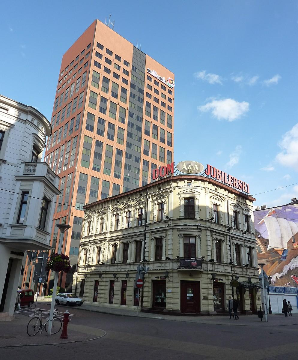 Zabytkowa kamienica przy Piotrkowskiej 146 przytłoczona współczesnym wieżowcem Red Tower